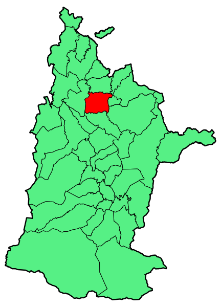 Aipaturiko udalerriaren kokapena Zuberoan